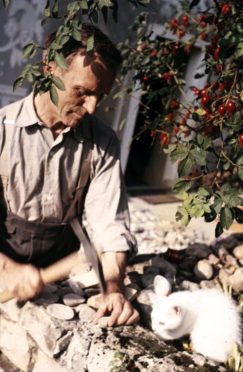 Walter Eglin beim Steine klopfen